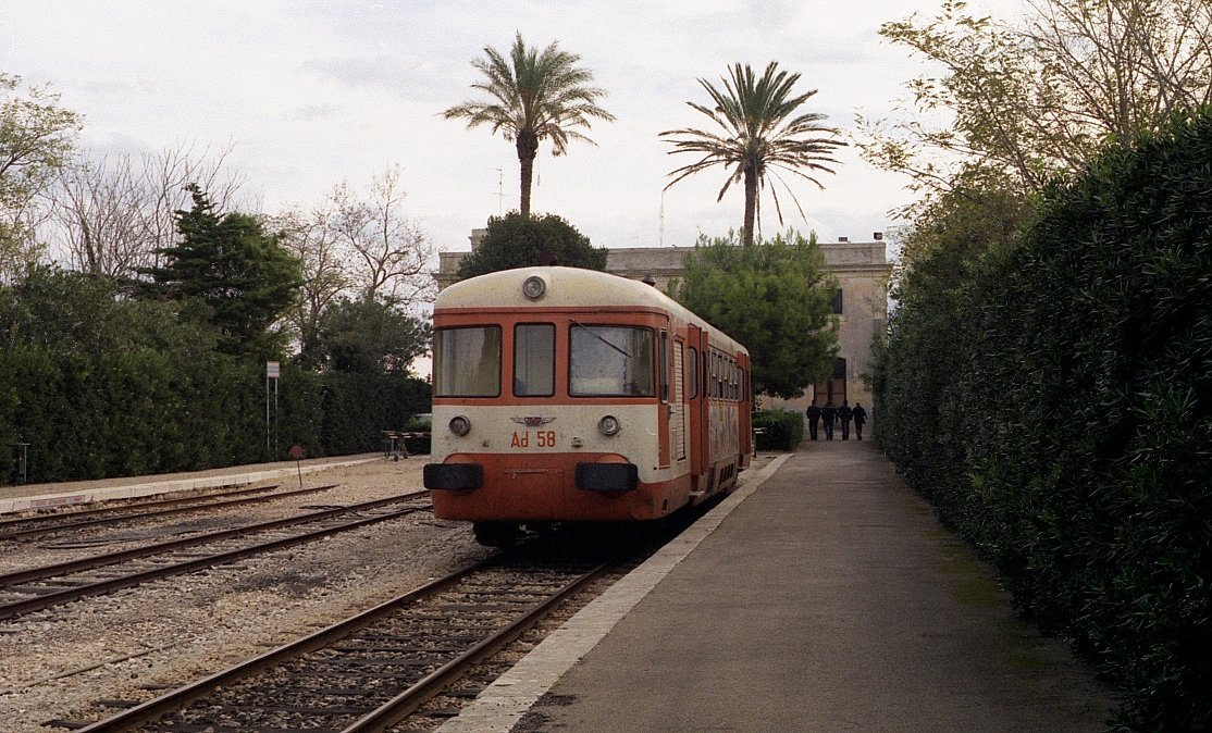 Motorový vůz Ad 58 společnsoti Ferrovie del Sud Est na nádraží v Otrantu, Itálie